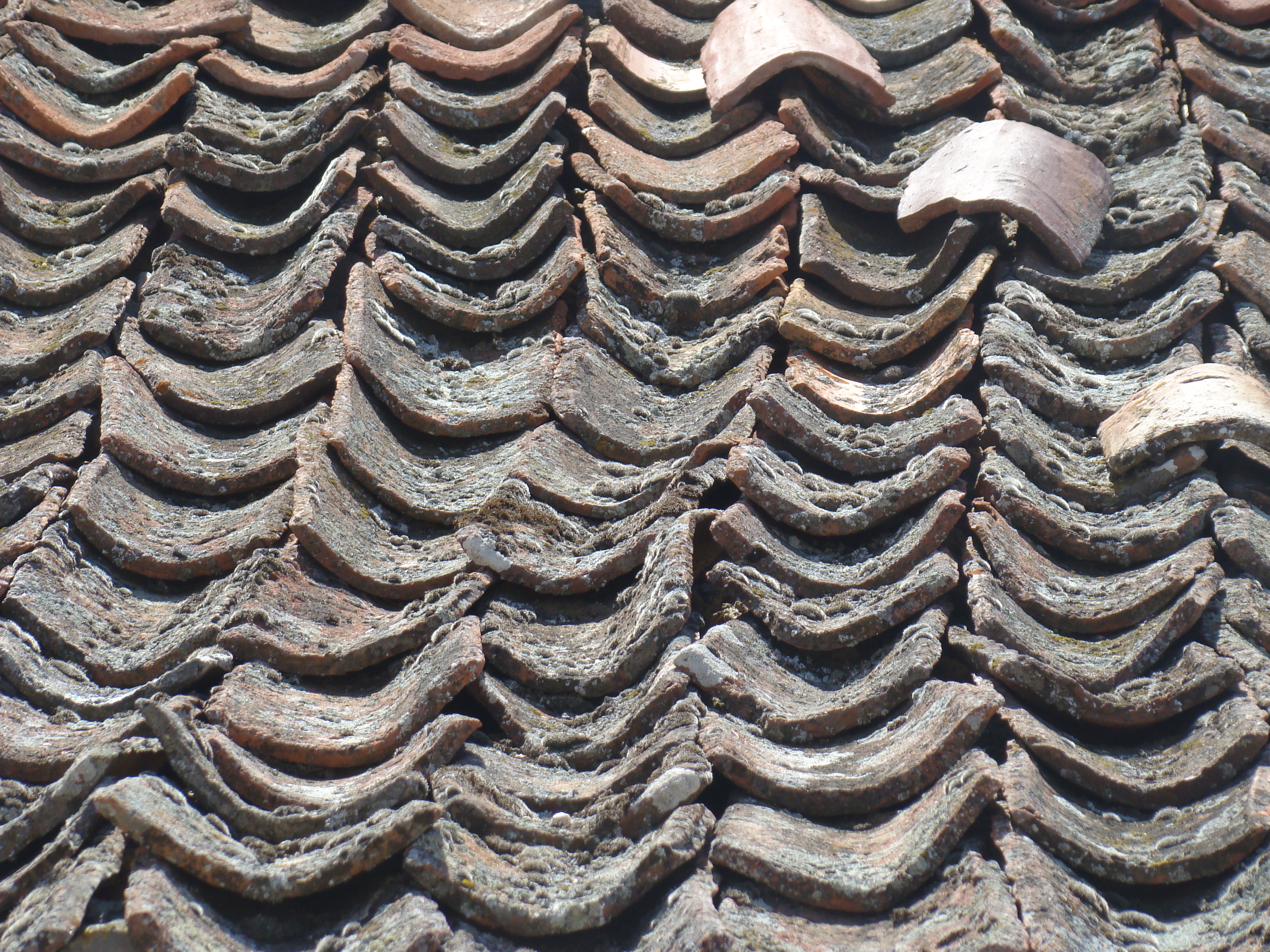 Tejado en la localidad segoviana de Tabanera la Luenga (España). Las tejas están dispuesta con el método llamado a la segoviana que consiste en colocar sólo piezas canales, recibidas sobre un lecho de barro que permite la dilatación e impermeabiliza las juntas, sin necesidad de piezas cobija.